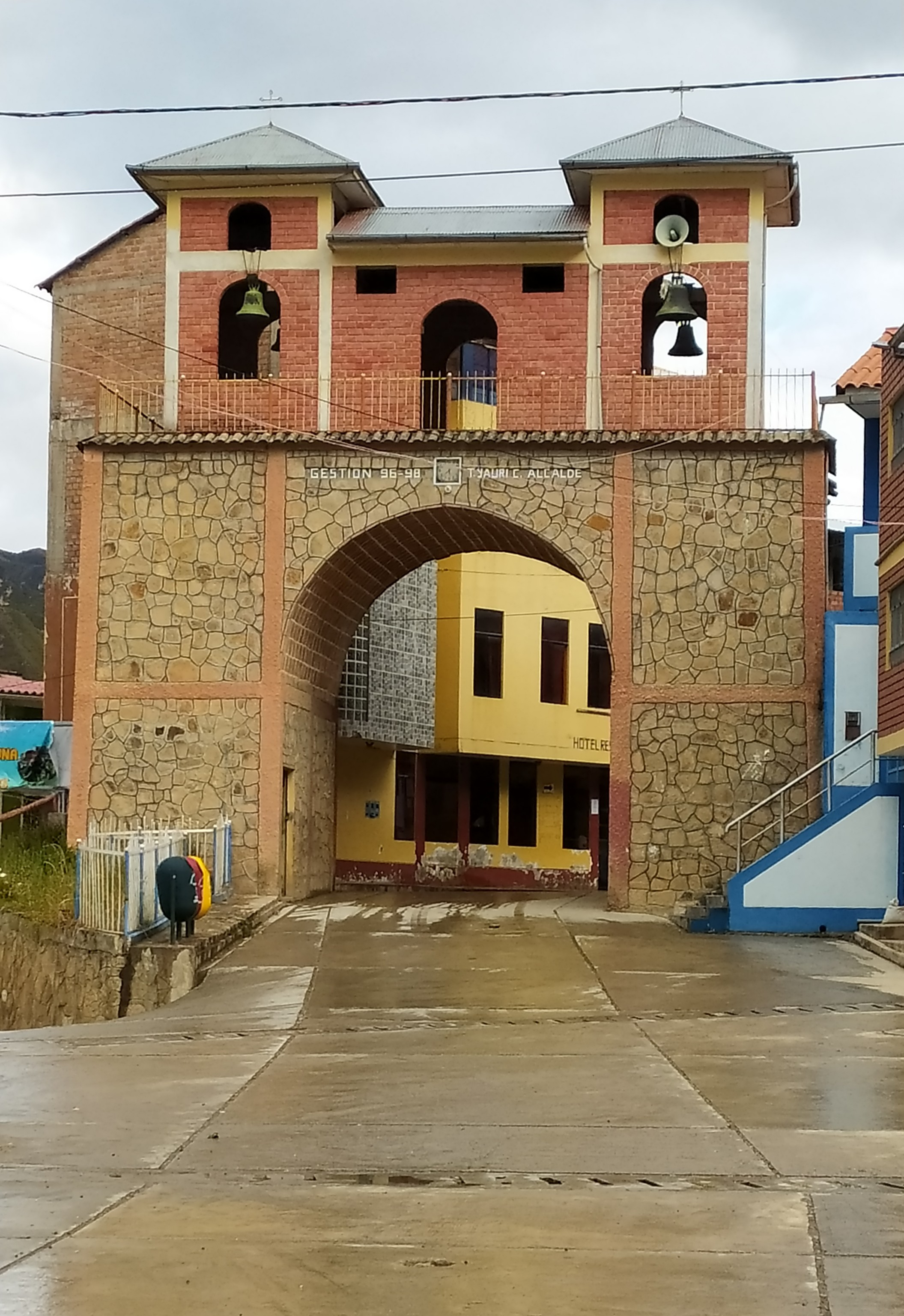 Antigua Torre de Campana de estilo colonial en el distrito de Vilcabamba, provincia Daniel Alcides Carrión, departamento Pasco.